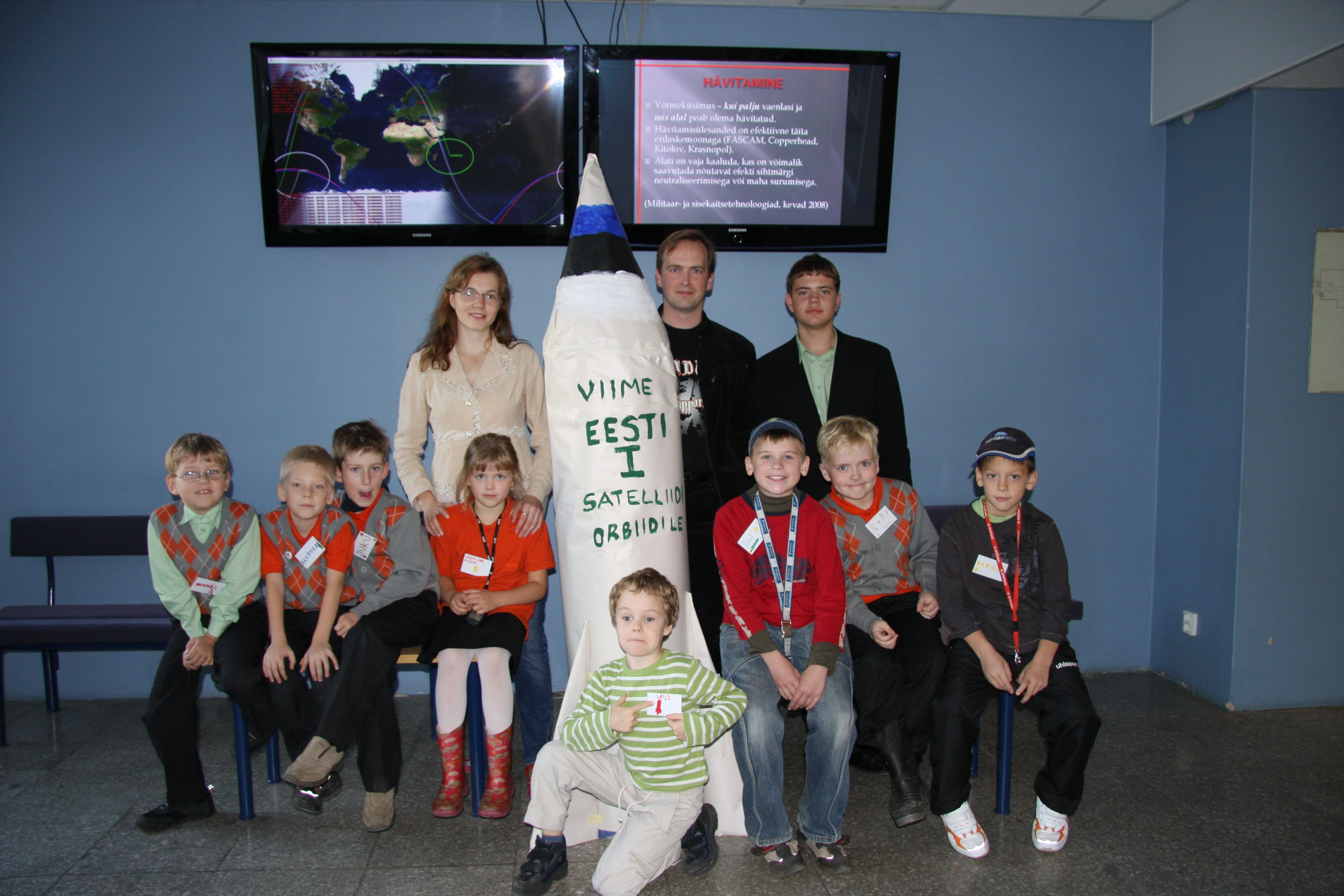 Estronaudid 2008